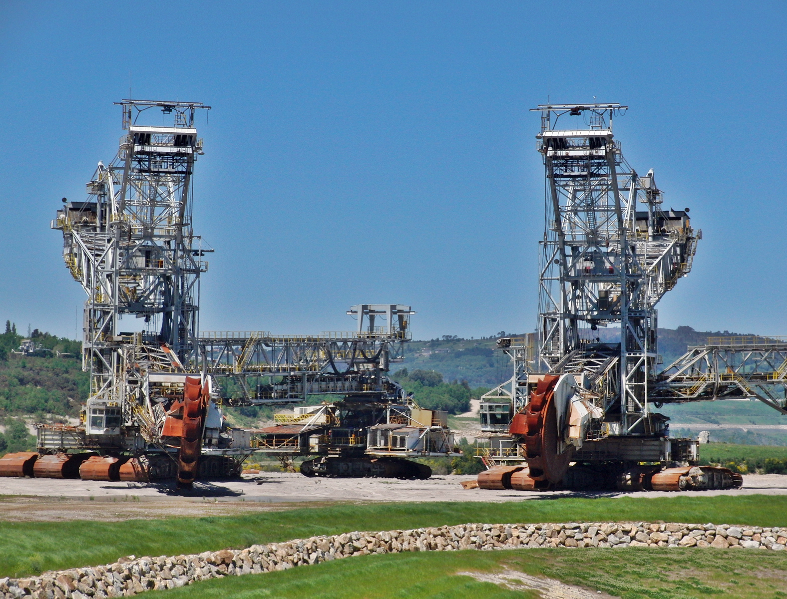 Excavadoras rotopala da antiga mina de lignito de As Pontes de García Rodríguez